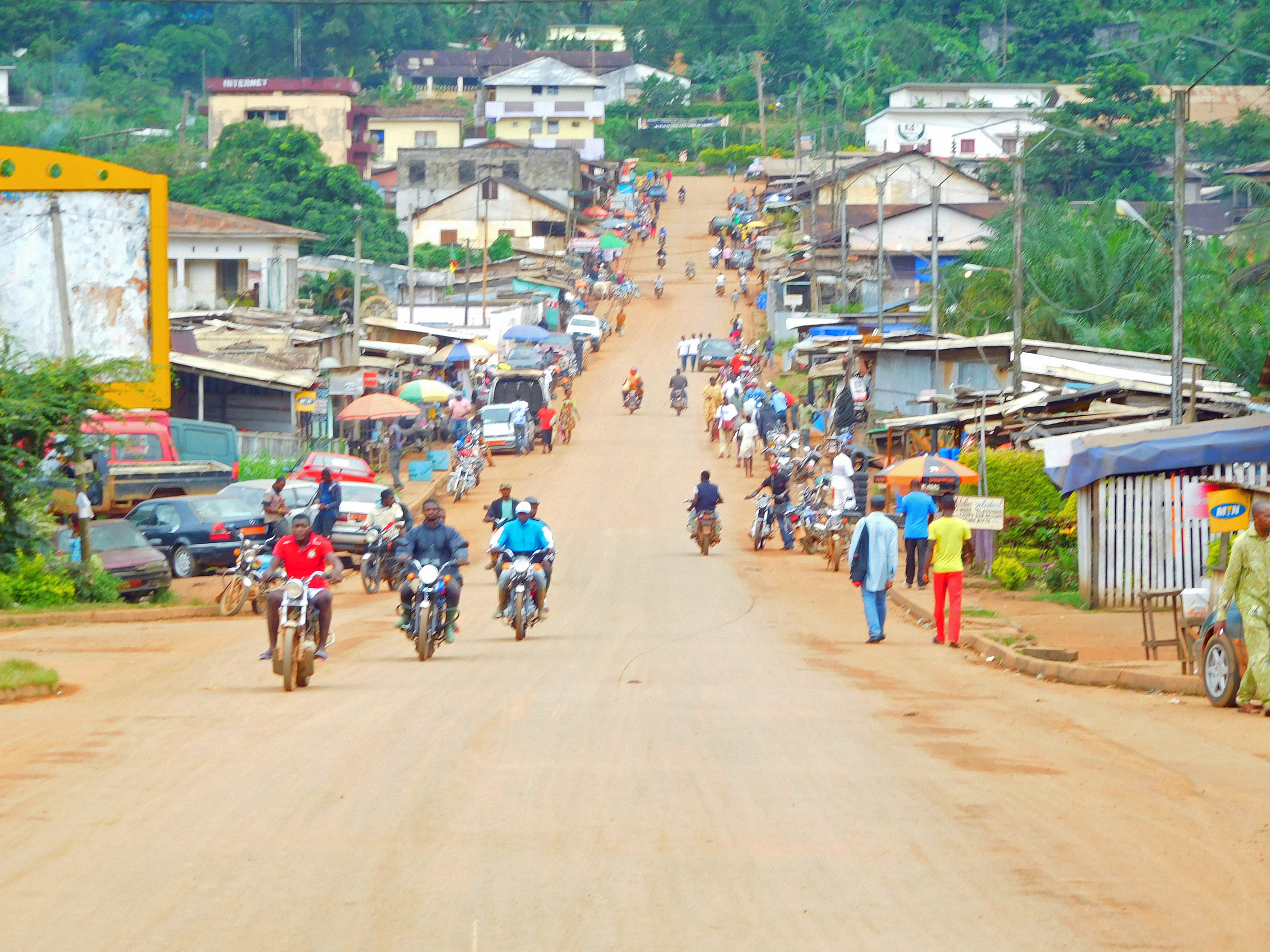 Avenue principale d'Éséka (Cameroun).